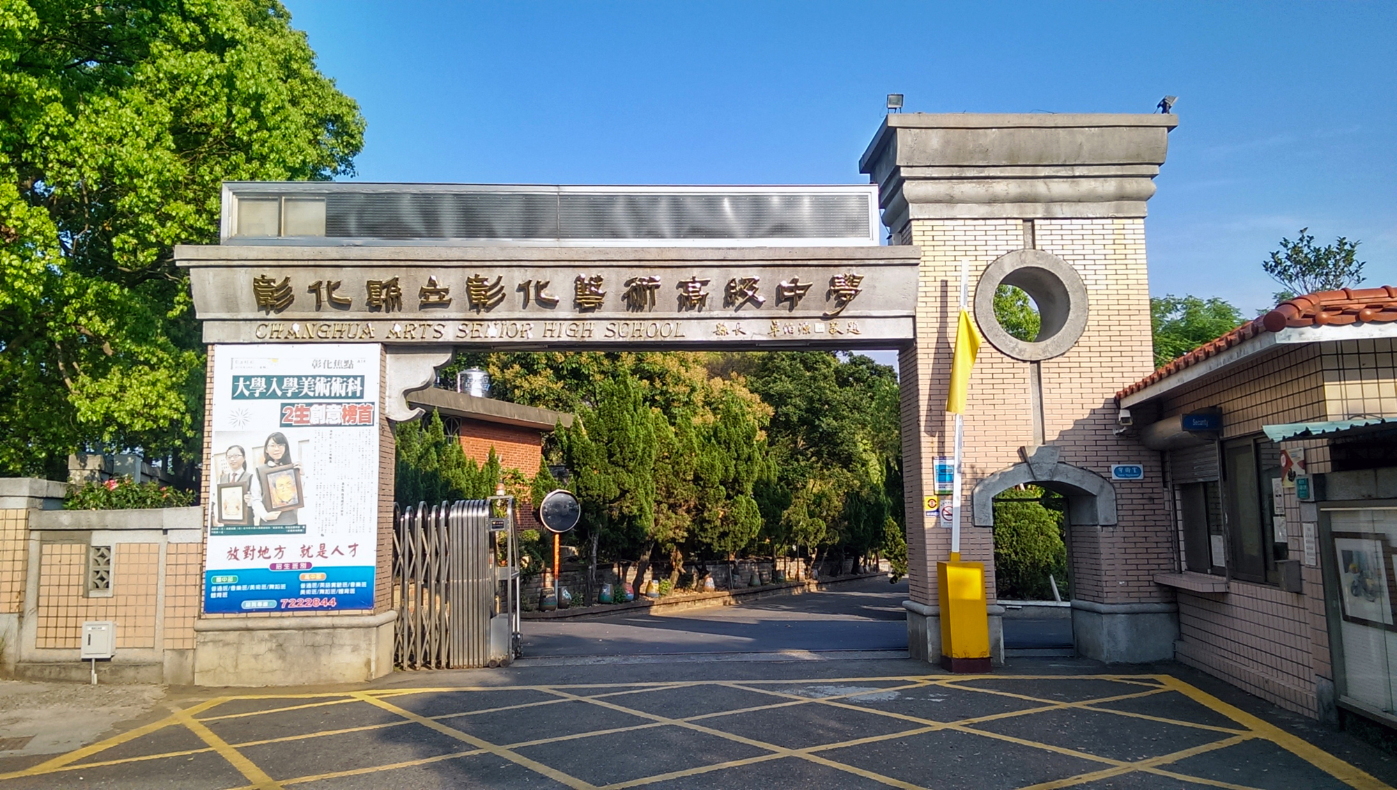 中文（台灣）: 彰化藝術高中正門